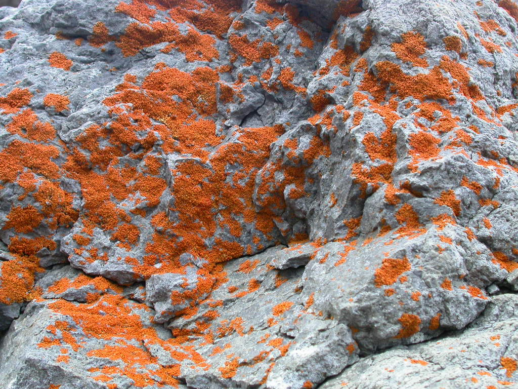 Porosty Oświadczam, że jestem autorem tego zdjęcia i nadaje mu status PD. Jojo